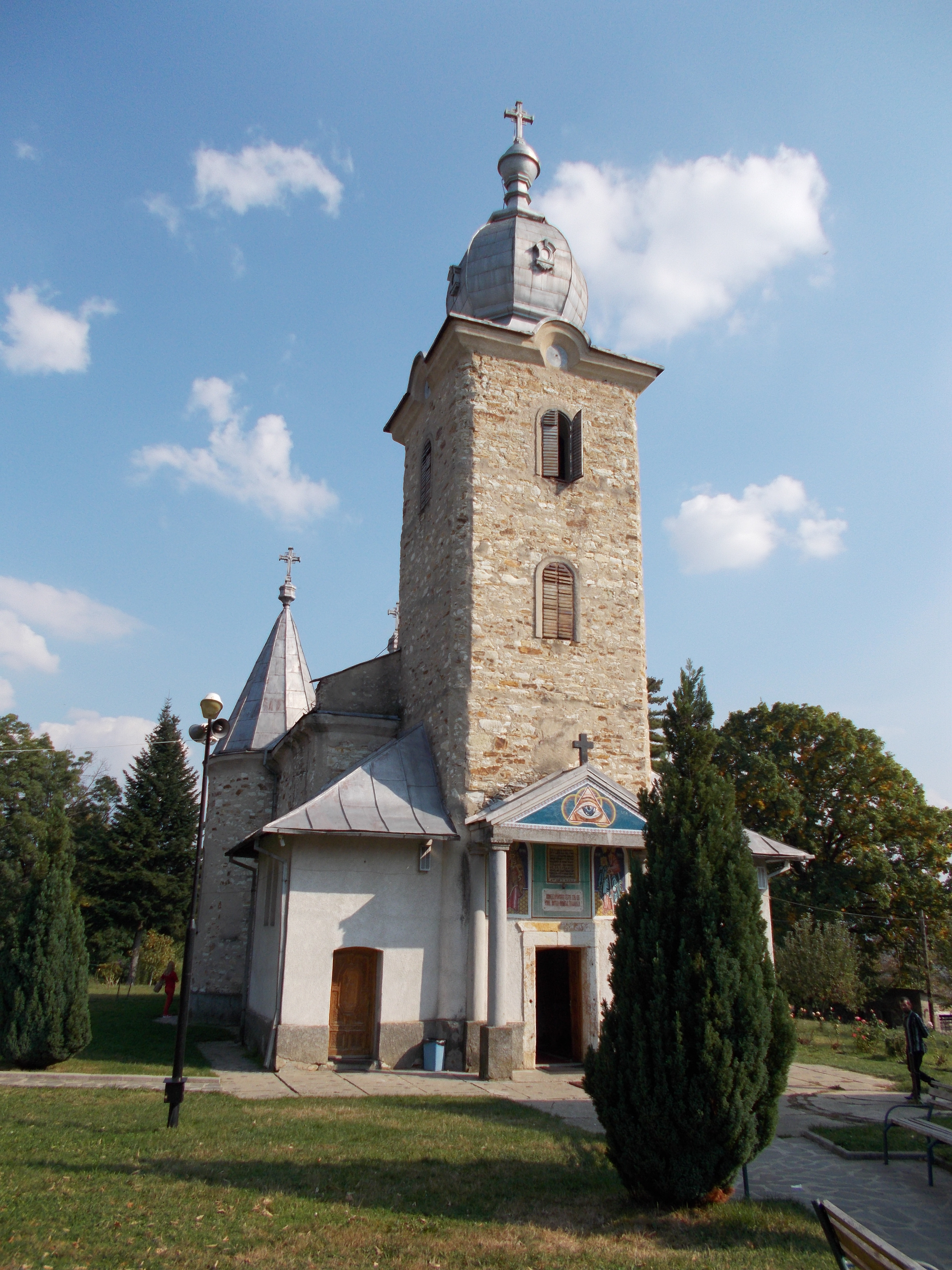 Biserica „Sf. Apostoli Petru și Pavel” a mănăstirii Bixad 01